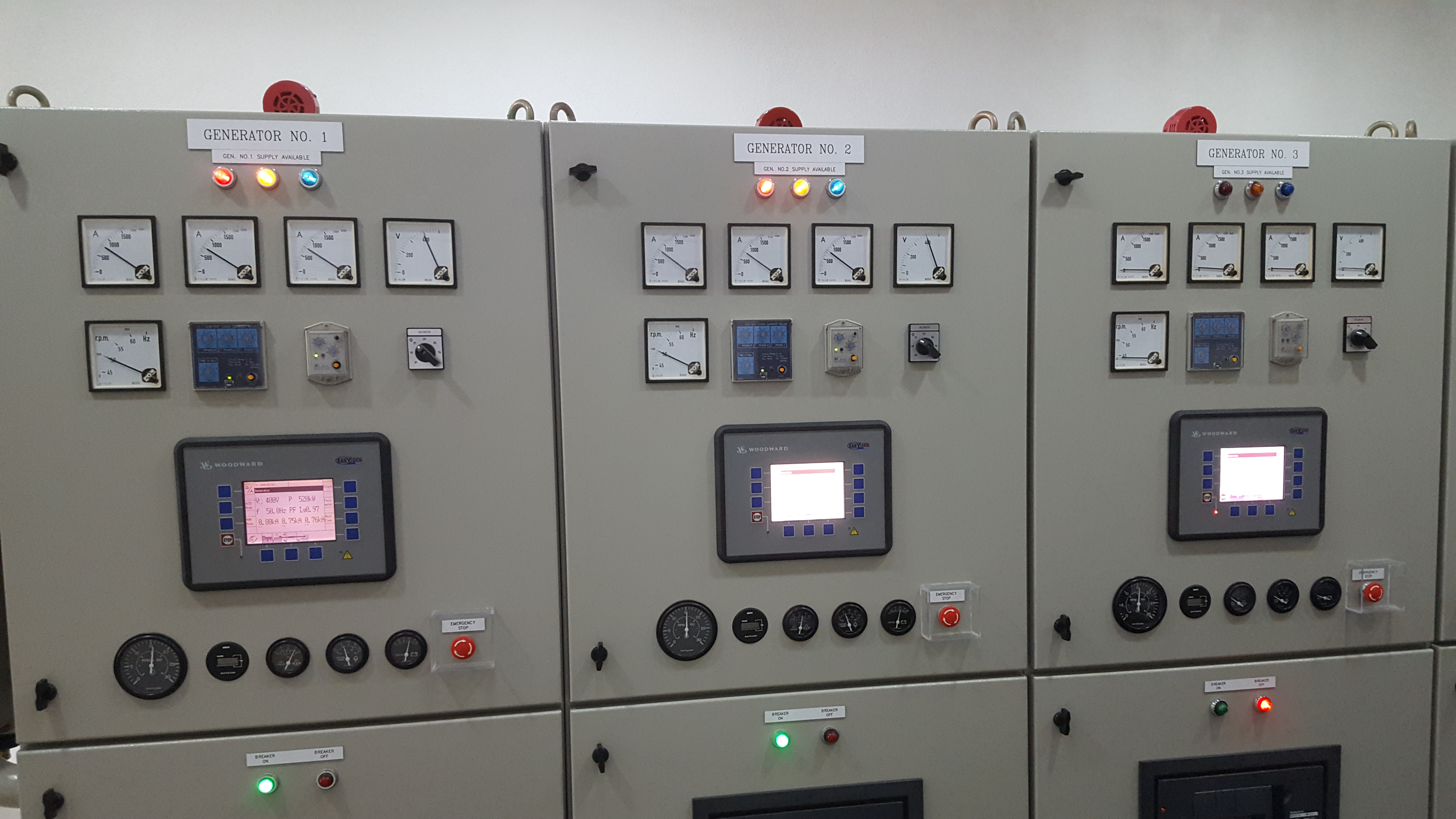 Powerhouse Leitstand der vier Stamford Generatoren.